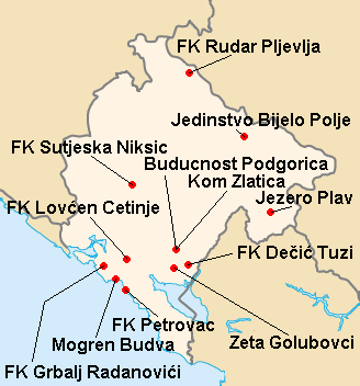 Répartition des clubs en Prva Crnogoska Liga 2008-2009.